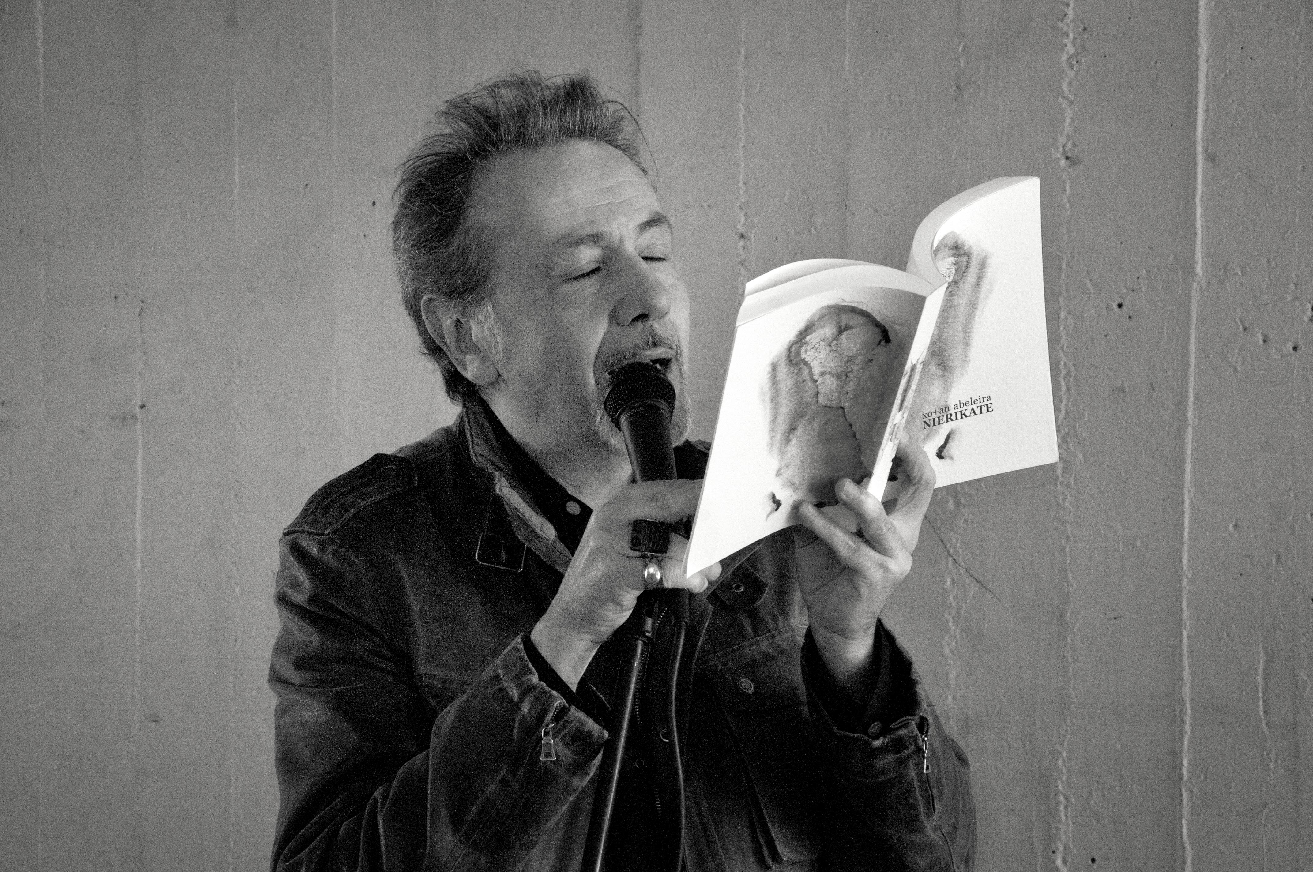 Xoán Abeleira recitando.